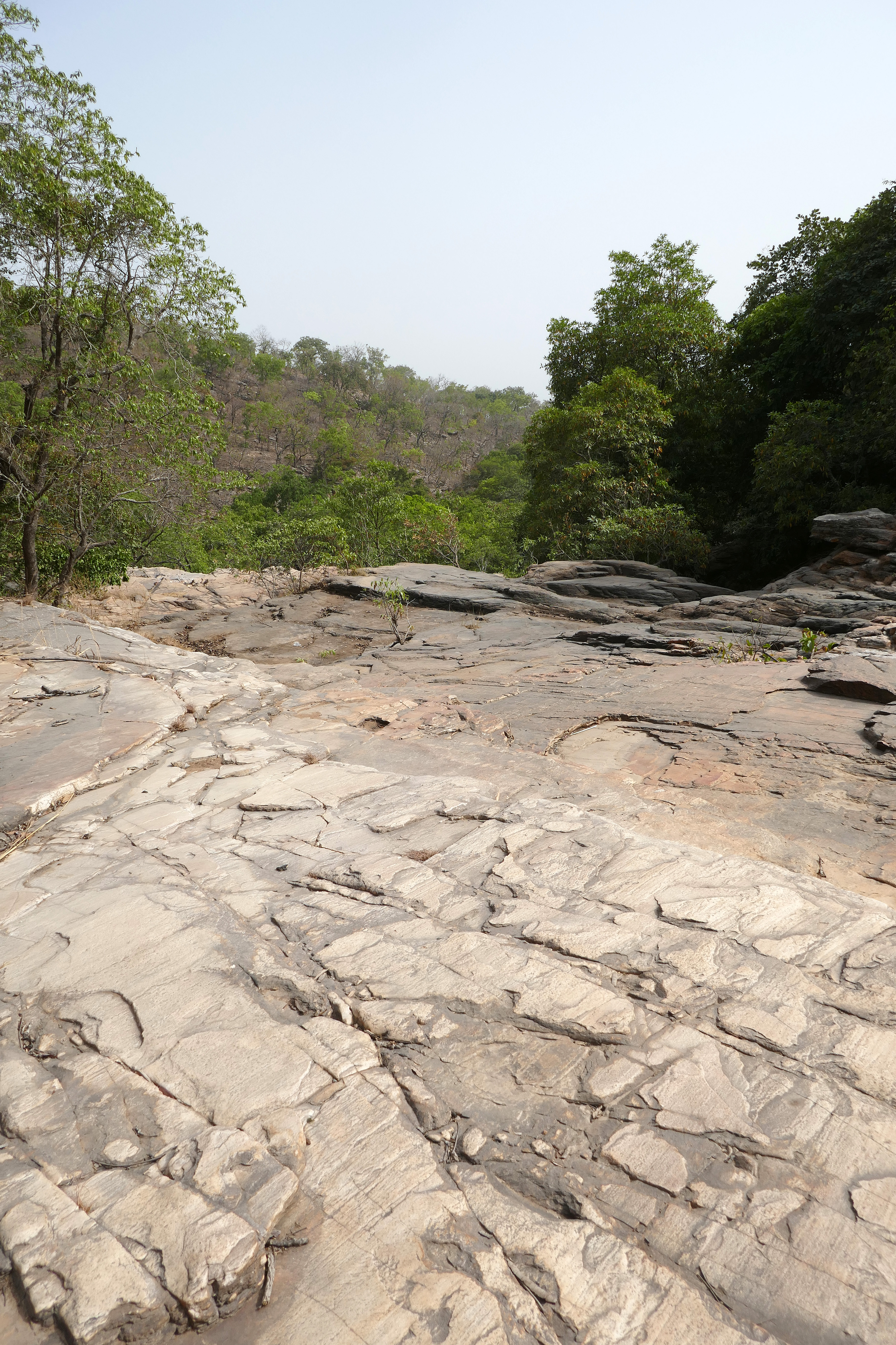 Formation rocheuse (grès schisteux) près des chutes de la Kota (Bénin).